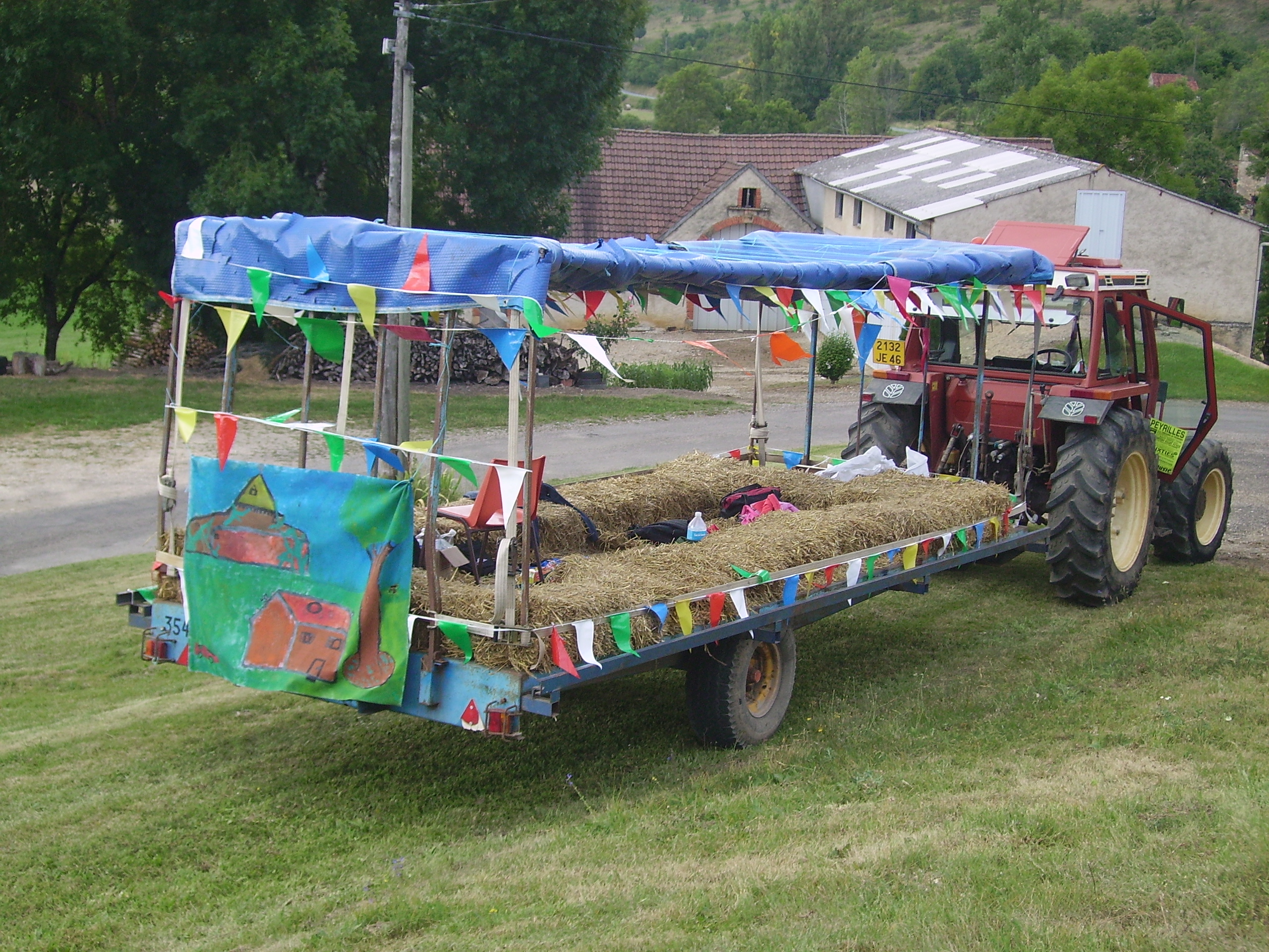 Aubades